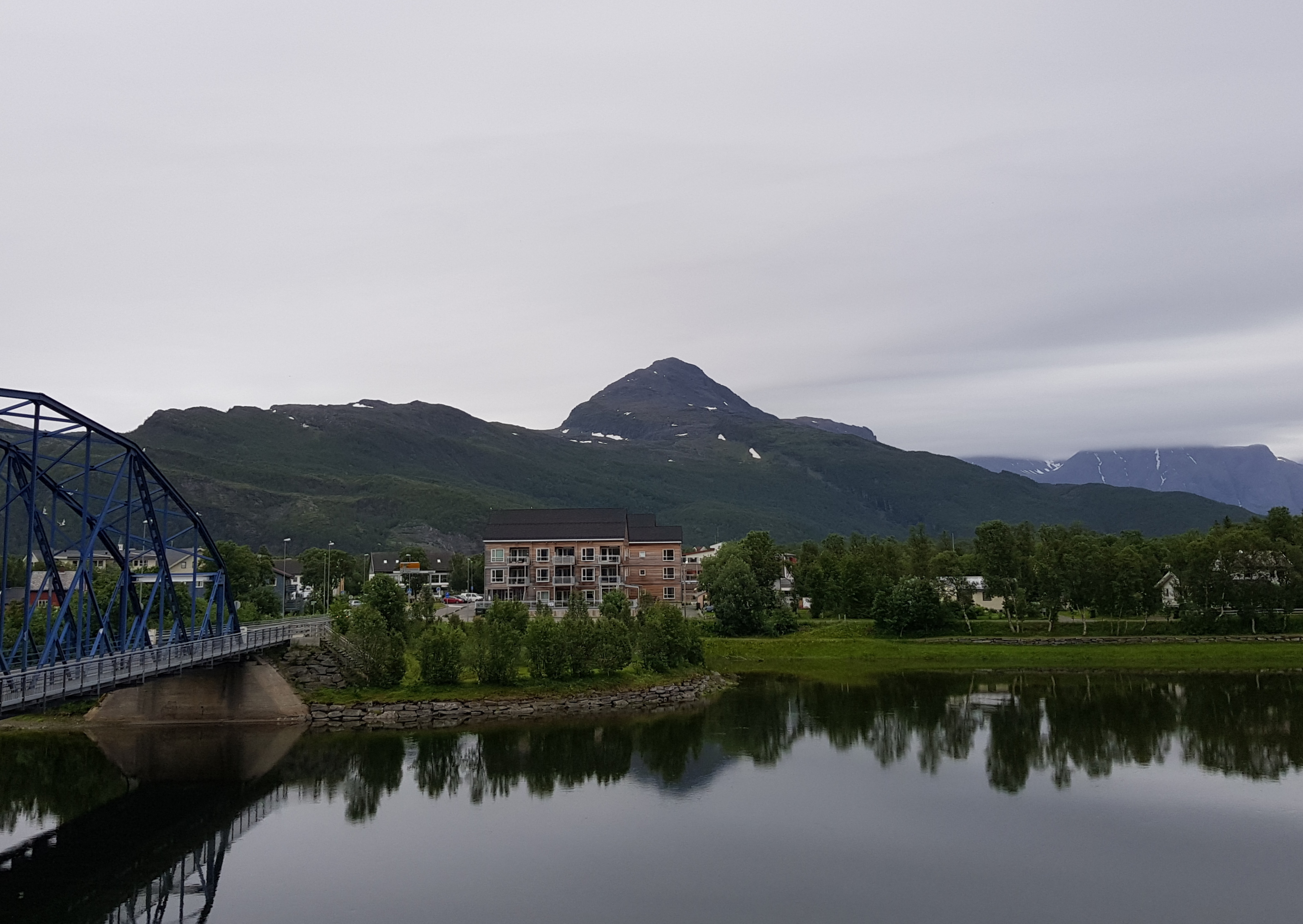 Jyppyrä er en markant topp i Båtfjellet, Nordreisa. Her sett fra administrasjonssenteret Storslett.